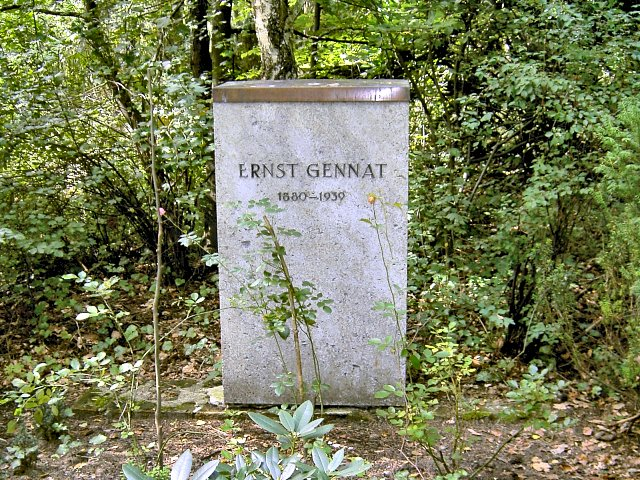 Beschreibung: Ernst Gennats Grab auf dem Südwestkirchhof Stahnsdorf. Block: Reformation, Gartenblock: II, Gartenstelle: 23 Quelle: eigene Aufnahme, Sommer 2005 Fotograf: Benutzer:Dr. Mabuse Lizenzstatus: GNU FDL oder Public Domain